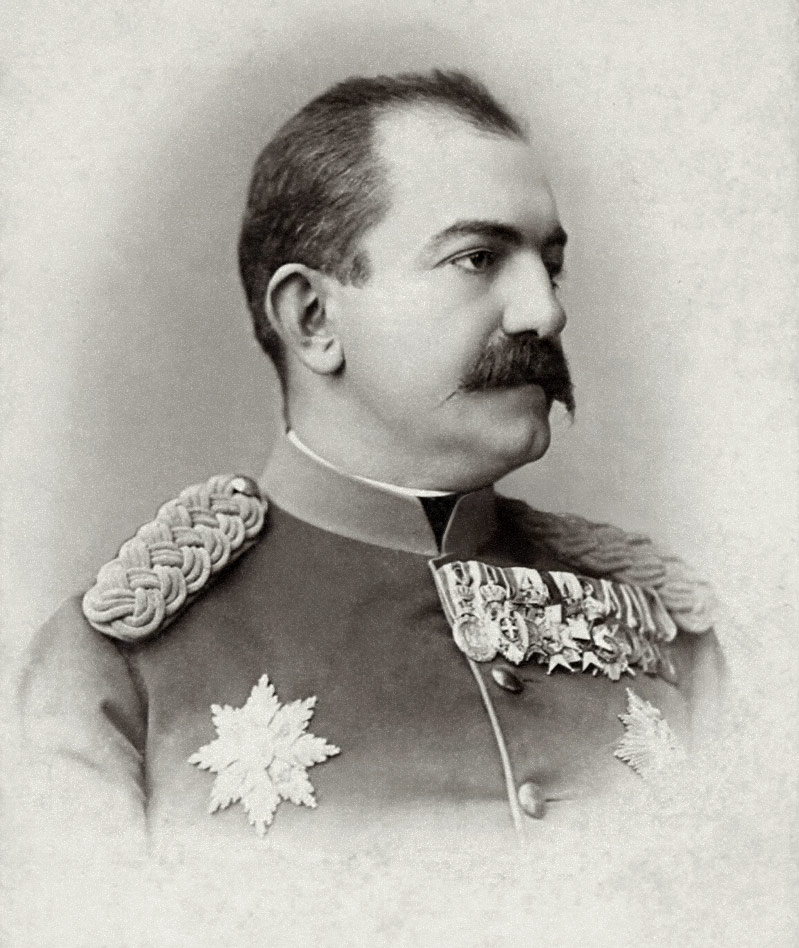 "Exkönig Milan †" --- Milan I. Obrenović (1854-1901), war 1868/1872 bis 1882 als Milan Obrenović IV. serbischer Fürst und 1882 bis 1889 als Milan I. König von Serbien